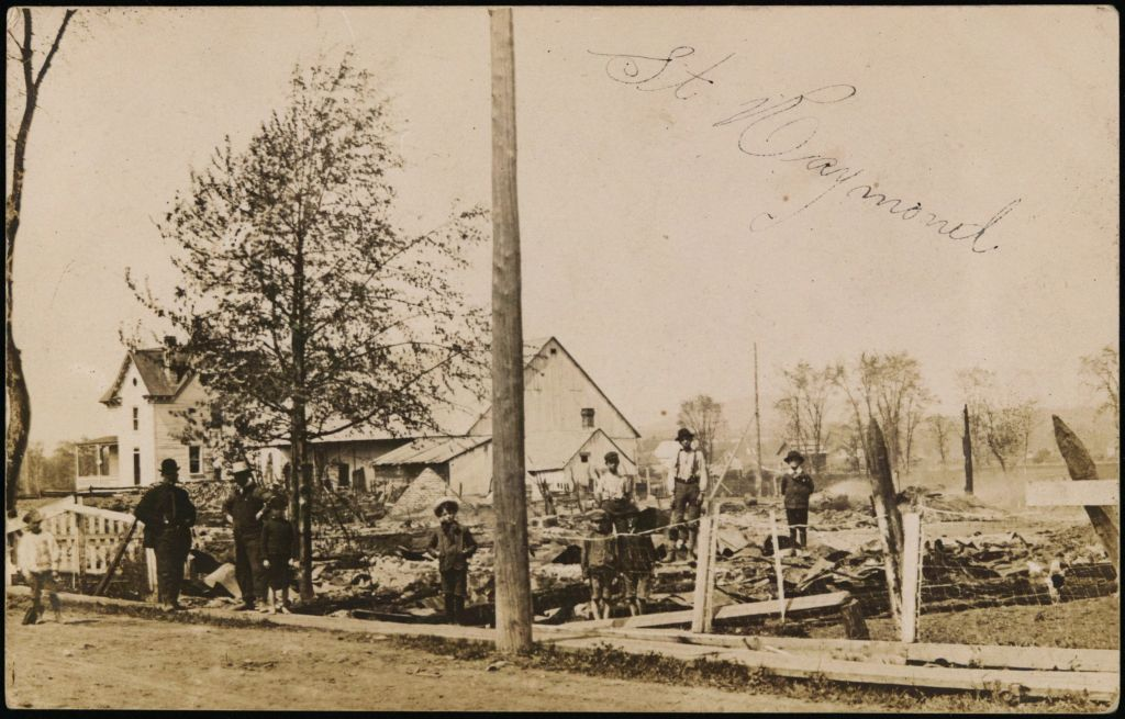 [Saint-Raymond] , carte postale, Eud. Plante, éditeur-dépositaire (Saint-Raymond)